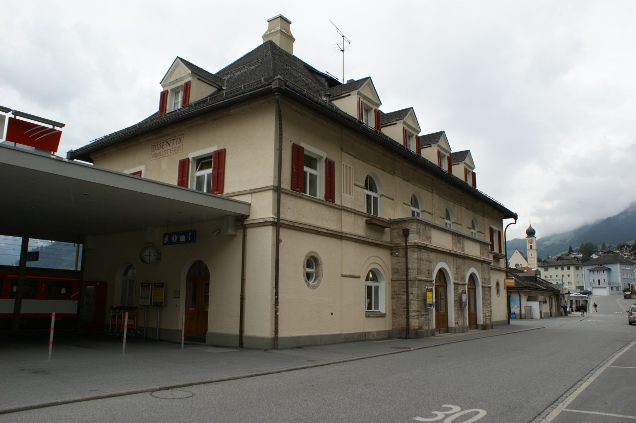 Bahnhof Disentis